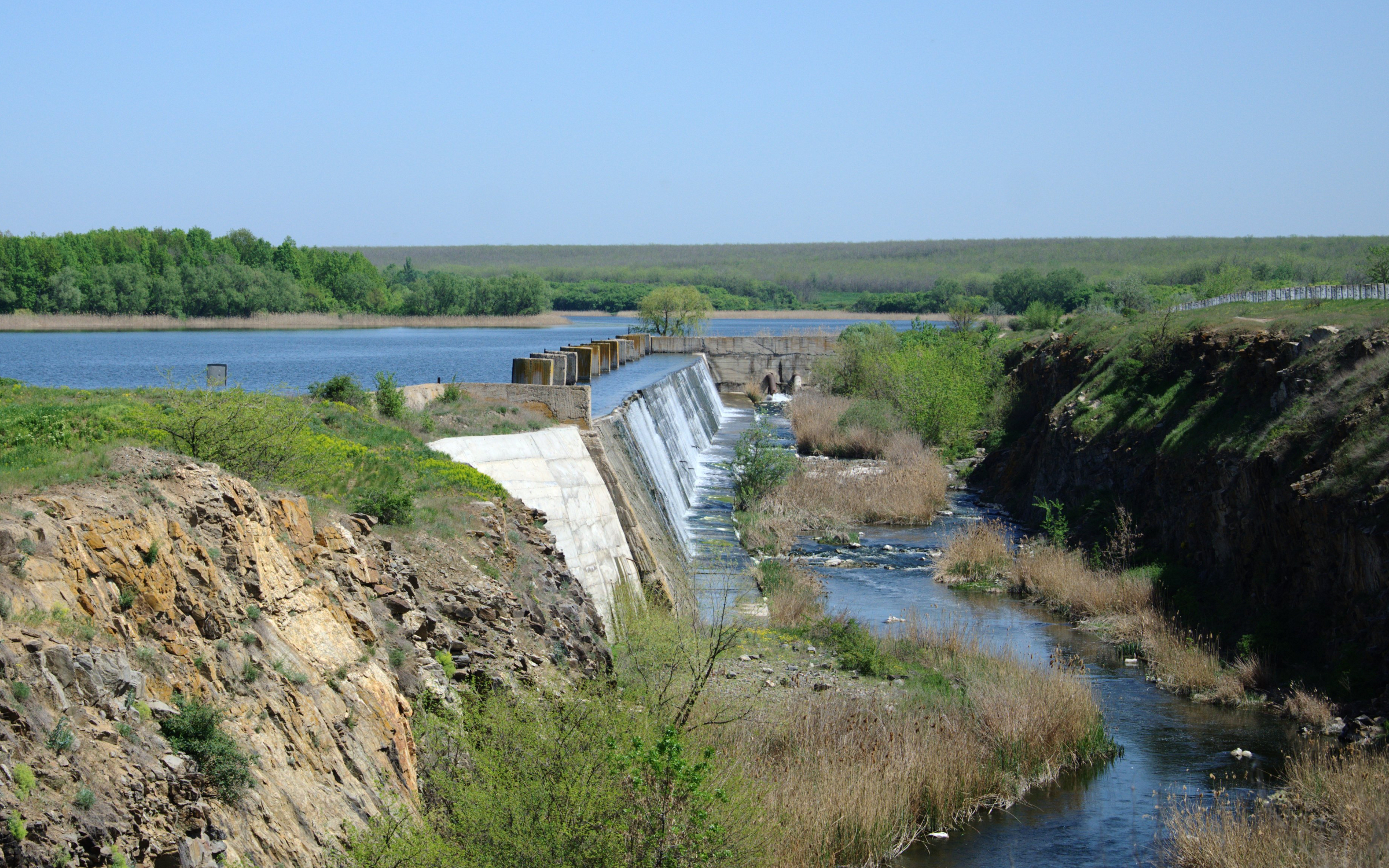 Sofiyivskiy_reservoir_spillway.jpg: Гребля Софіївського водосховища